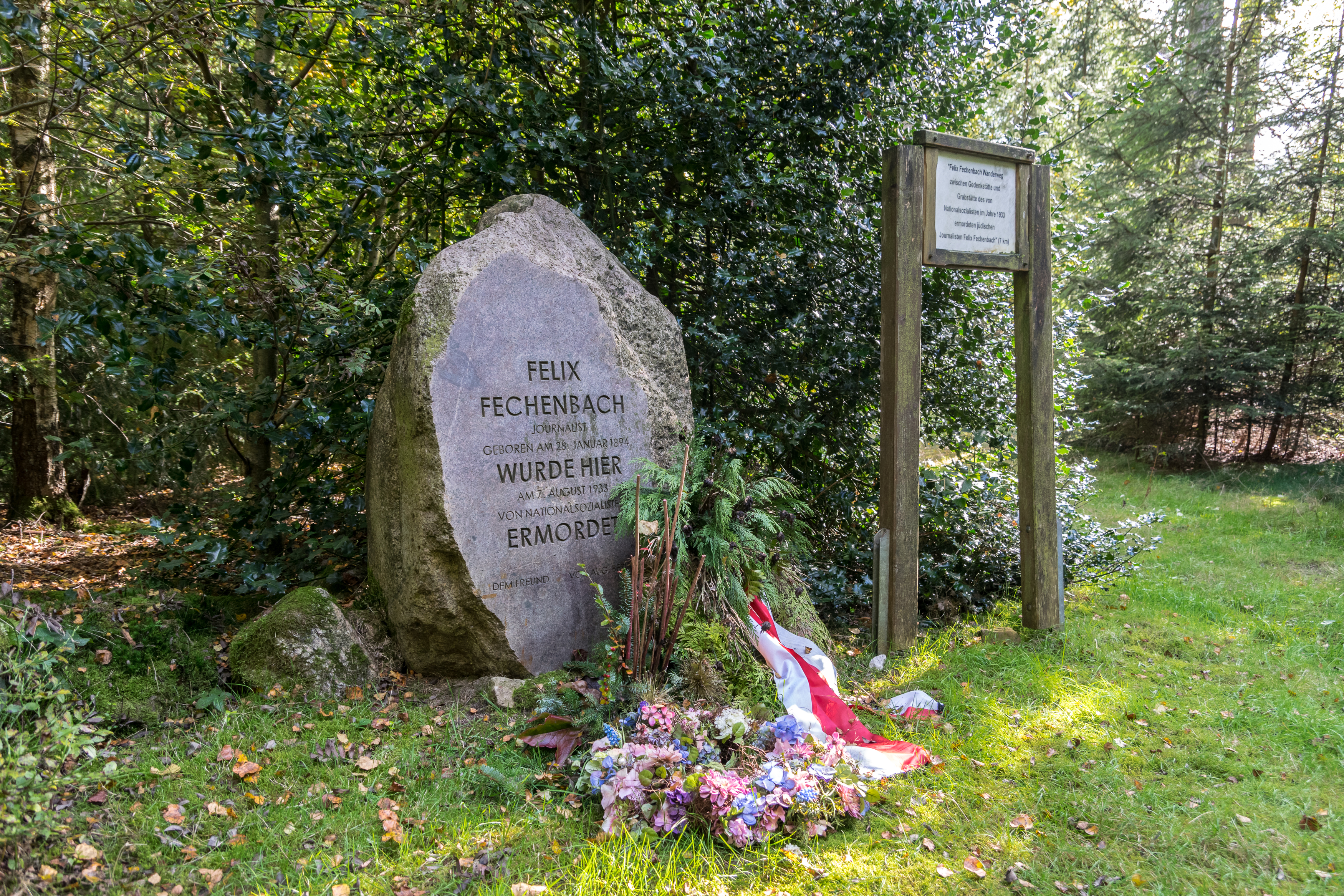 Denkmal für Felix Fechenbach am Ort seiner Ermordung im Kleinenberger Wald, aufgestellt 1973 von seinem Freund und Weggefährten August Berlin